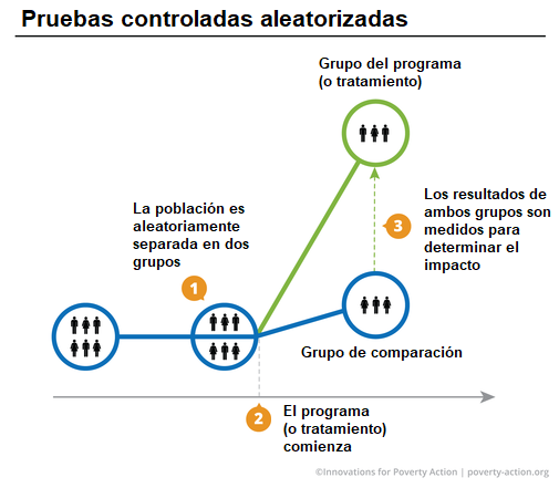 La imagen es para fines académicos.